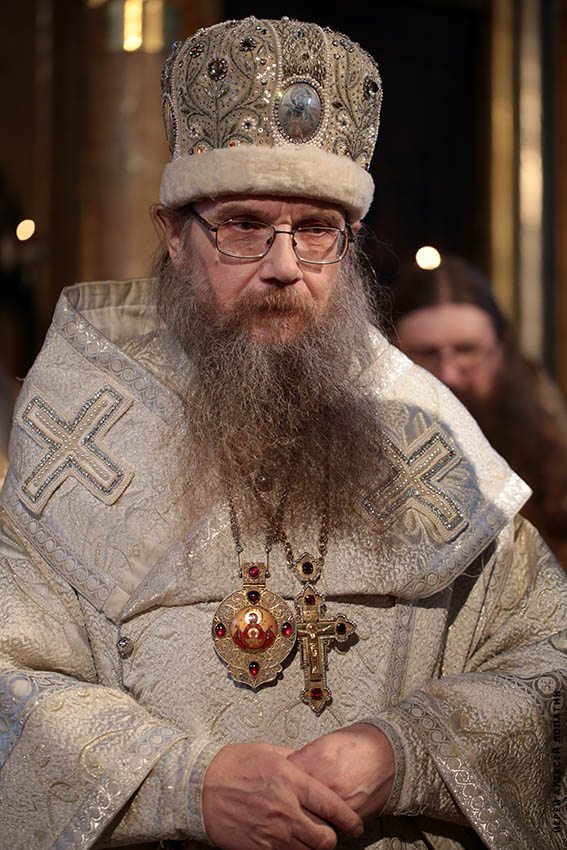 Епископ Григорий (Коробейников)